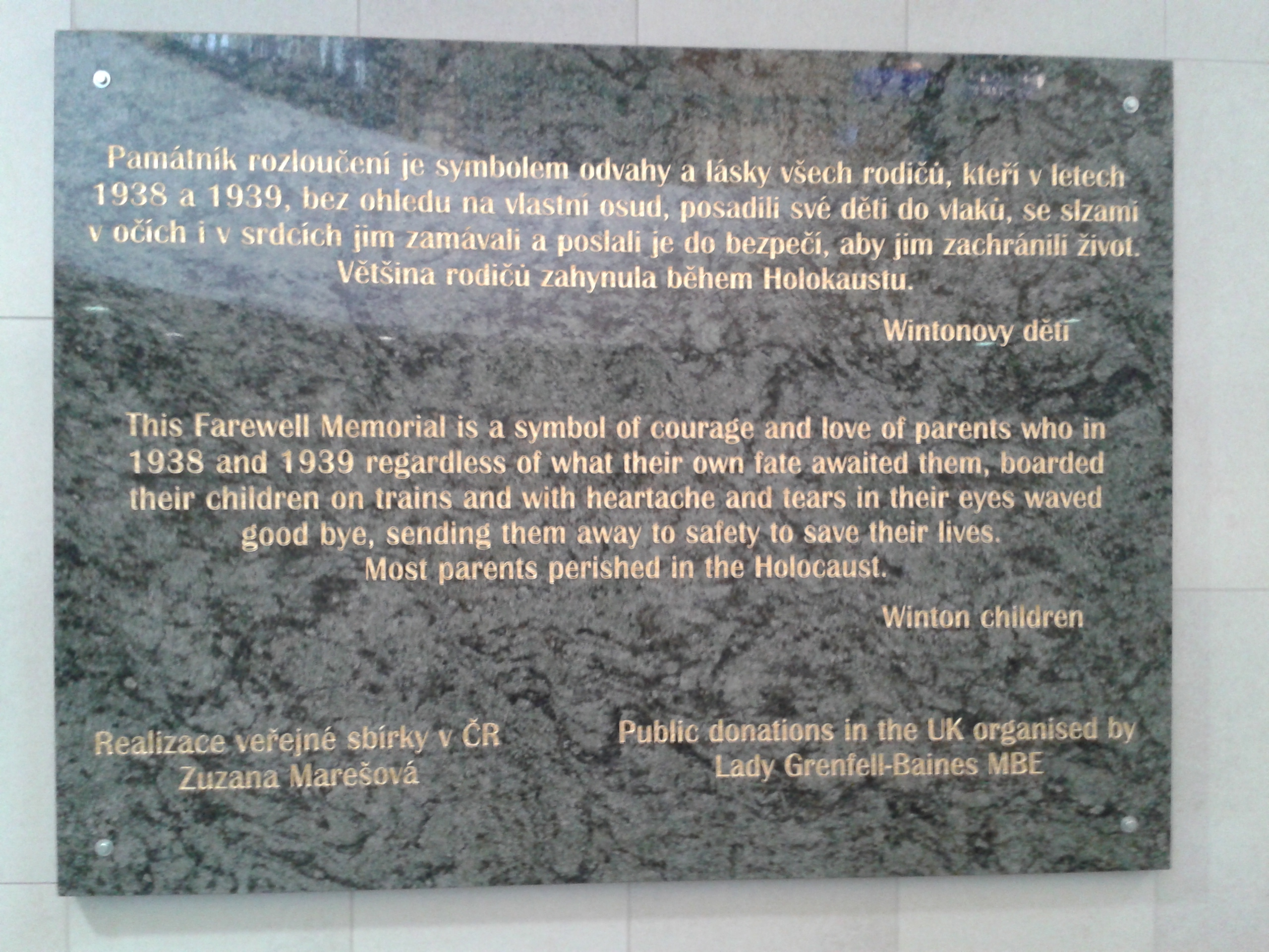 Památník rozloučení byl slavnostně odhalen dne 27. května 2017 na pražském Hlavním nádraží. Památník rozloučení je trvalým místem připomínajícím odvahu rodičů (tzv. Wintonových dětí) poslat své děti do neznáma, oceňuje jejich lásku jakož i fatální rozhodnutí, které většině převážně židovských dětí umožnilo v letech 1938 a 1939 odjezd do Spojeného království a tím jim zachránilo život. Doprovodná kamenná pamětní deska ve volně přístupném prostoru na stěně chodby (v průchodu z odjezdové haly k nástupištím) vlevo od památníku rozloučení.